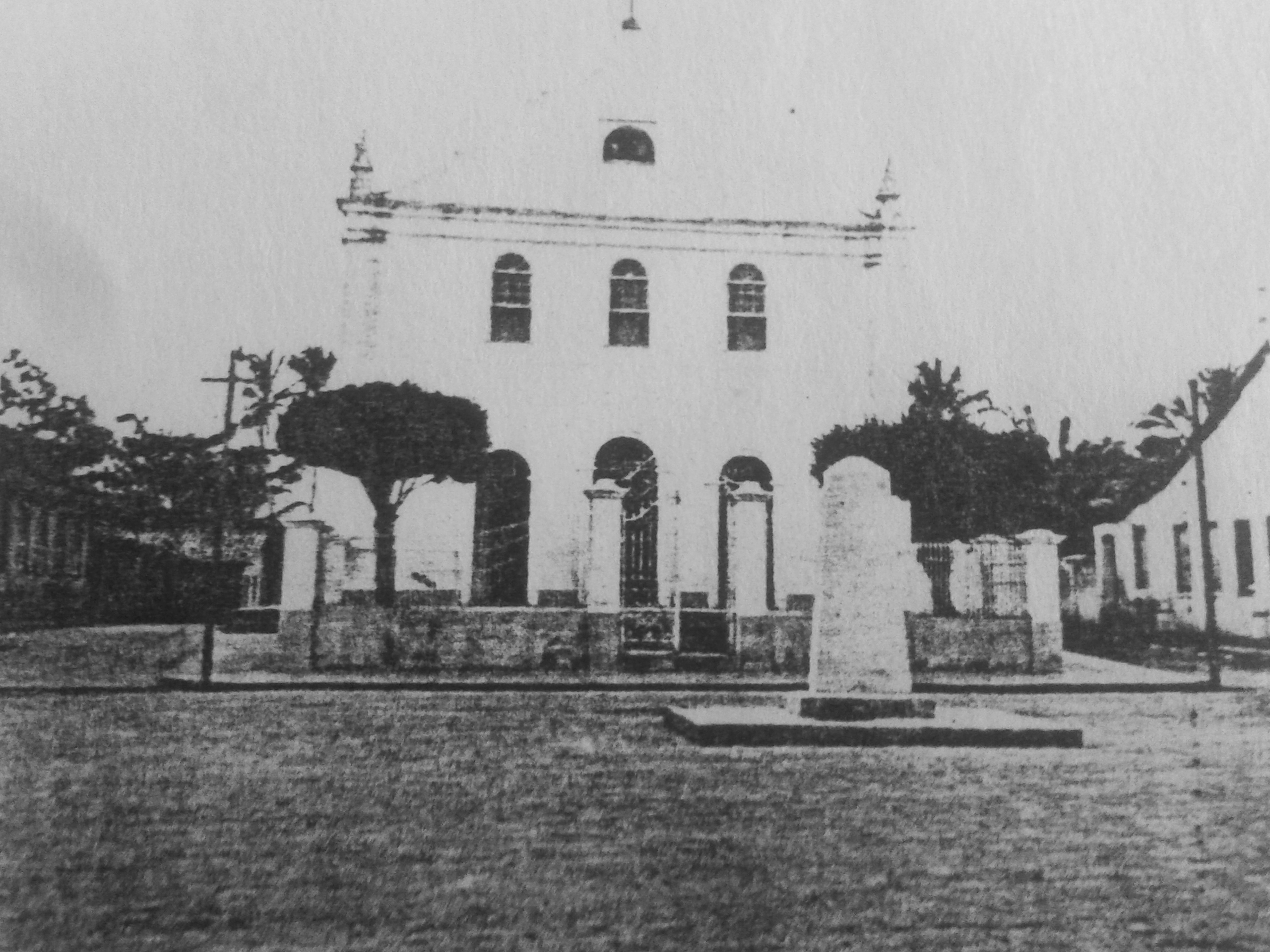 Imagem da Igreja do Bom Jesus da Passagem depois da reforma do final do século XIX. Fonte: Arquivo Público de Pojuca/ Livro Pojuca: o Arraial da Passagem